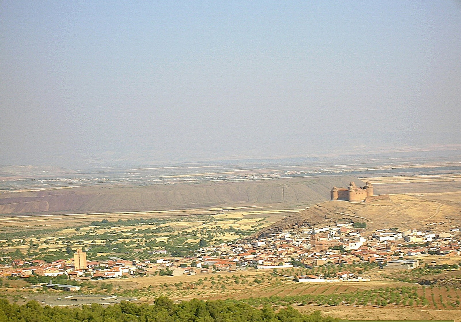 Vista de La Calahorra (Granada). Nikon 4500